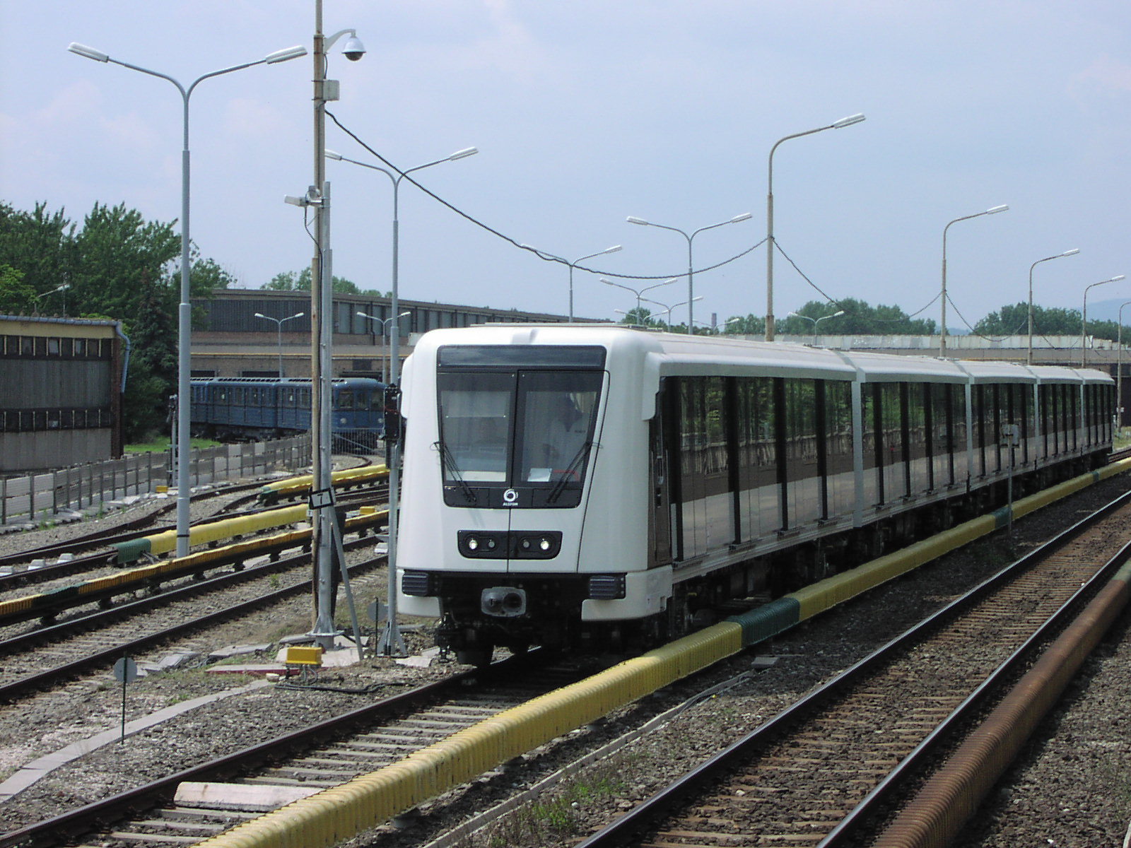 Az új Alstom szerelvény tesztelése a Pillangó utca és a Fehér út közötti próbapályán (Budapest)